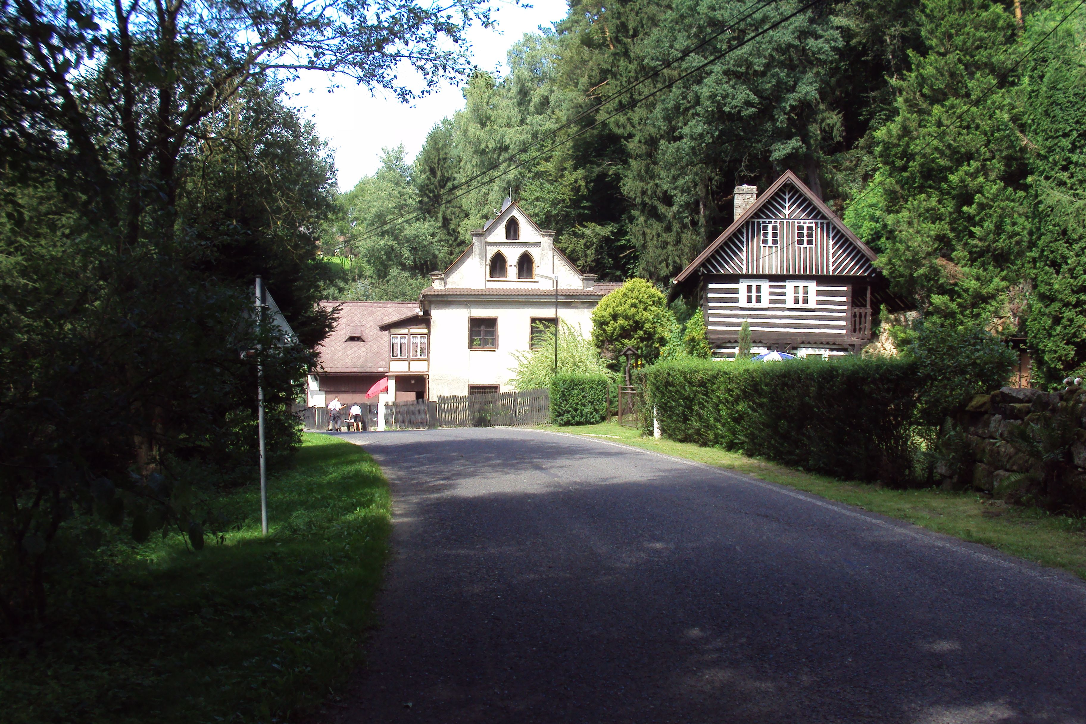 Křenovský dvůr při silnici do Dubé od Tubože